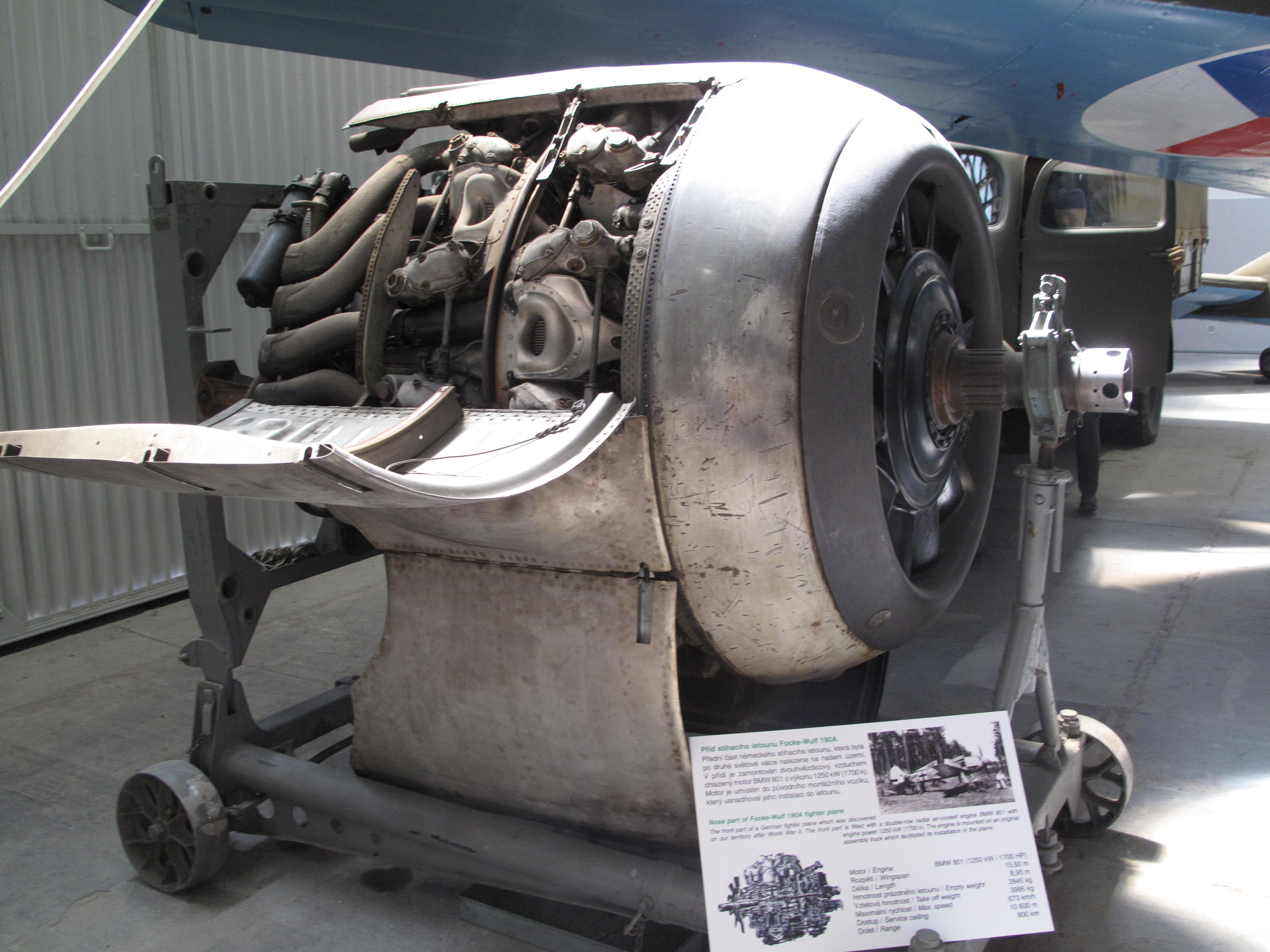 Letecké muzeum Kbely